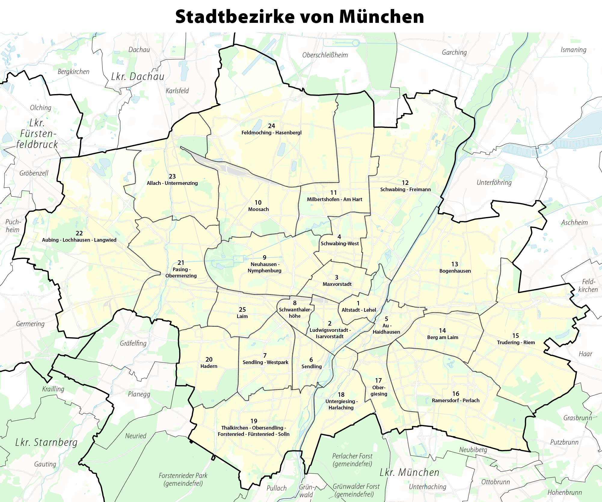 Karte der Stadtbezirke in MünchenHinweis: Die dargestellten Grenzlinien können nur einen ungefähren Eindruck von deren tatsächlicher räumlichen Lage vermitteln. Für genauere Informationen deshalb bitte unbedingt die entsprechenden amtlichen Nachschlagewerke zu Rate ziehen!